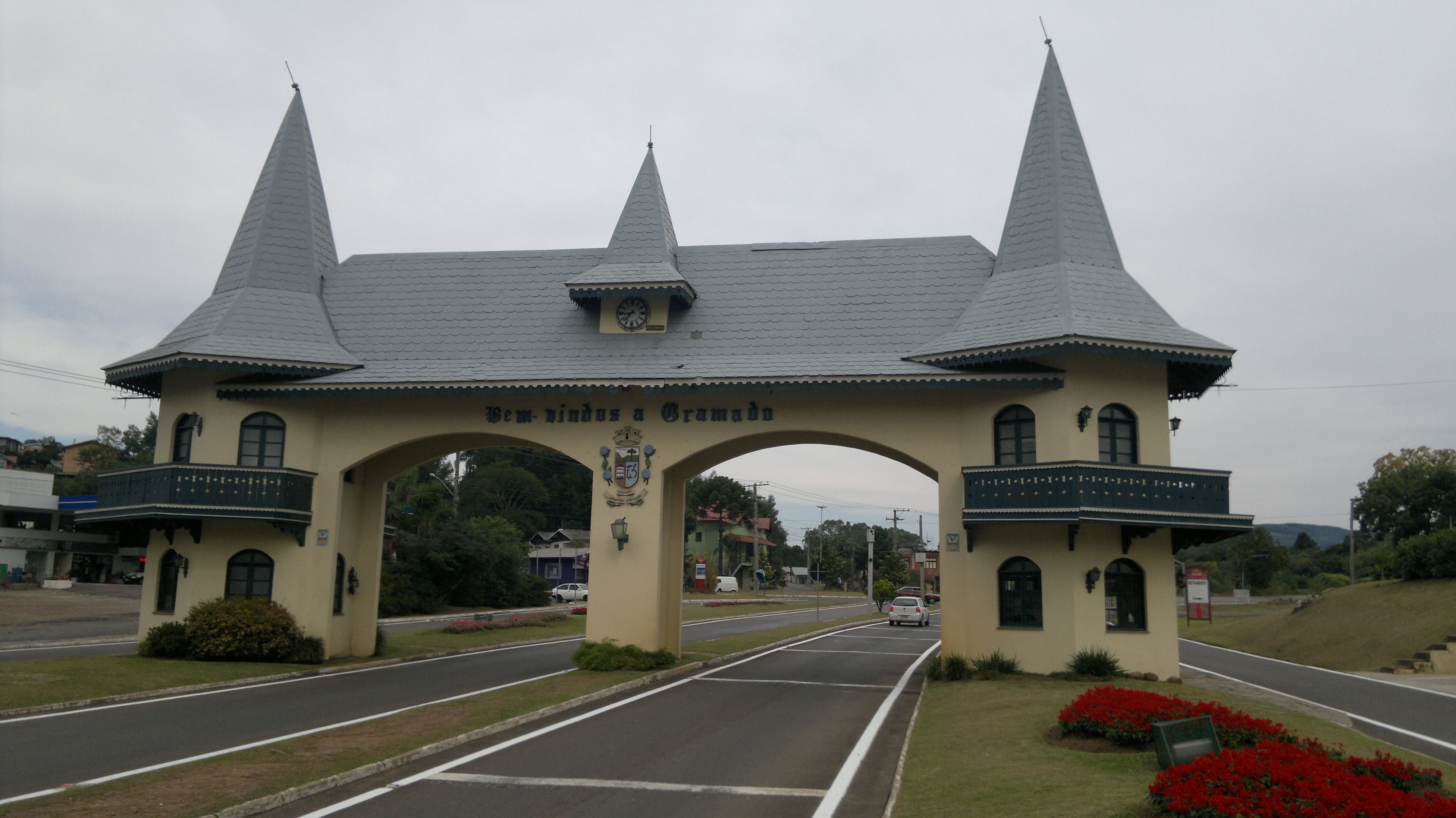 Gramado-RS 2012 Nokia N8